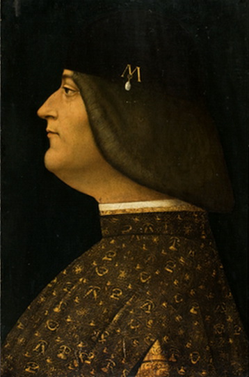 Ludovico Sforza Giovanni Antonio Boltraffio (Anonimo lombardo sec. XV/ XVI), Ritratto di Ludovico il Moro (Milano, Collezione principe Trivulzio)